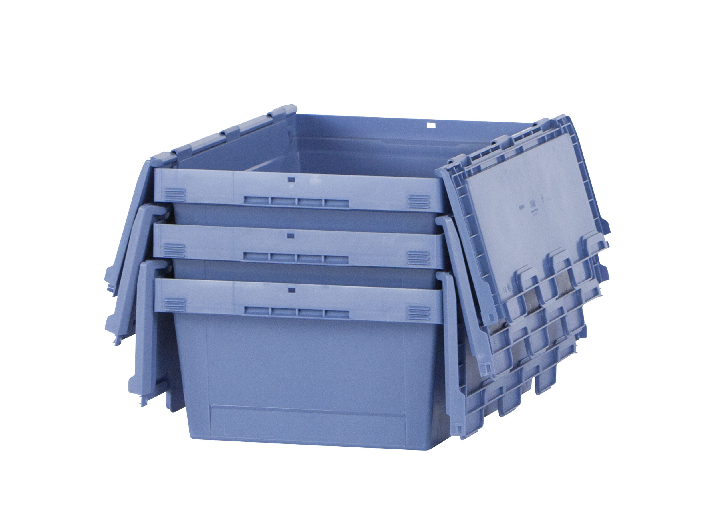 Nestbare Behälter genestet